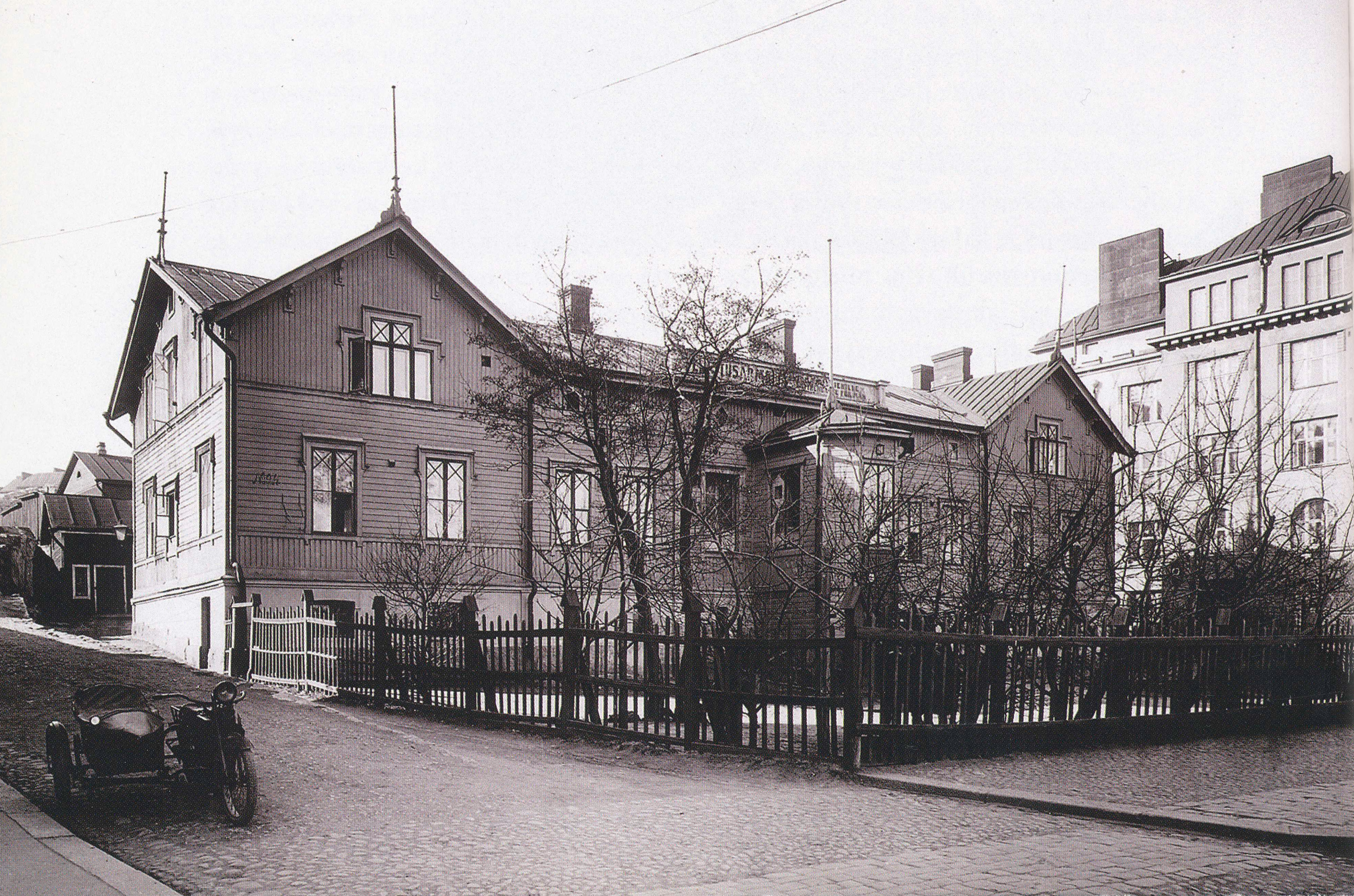 Alli Tryggin Helsingin Kalliossa ylläpitämä Kansankoti.